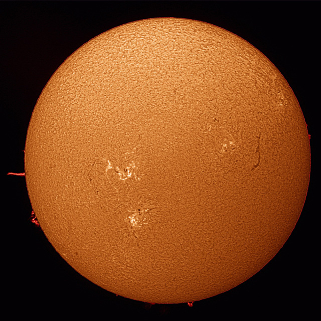 Sonne mit Wasserstoff-alpha-Filter fotografiert. Ein Wasserstoff-alpha-Filter ist ein Interferenzfilter, der nur das Licht des ionisierten Wasserstoffes durchlässt.